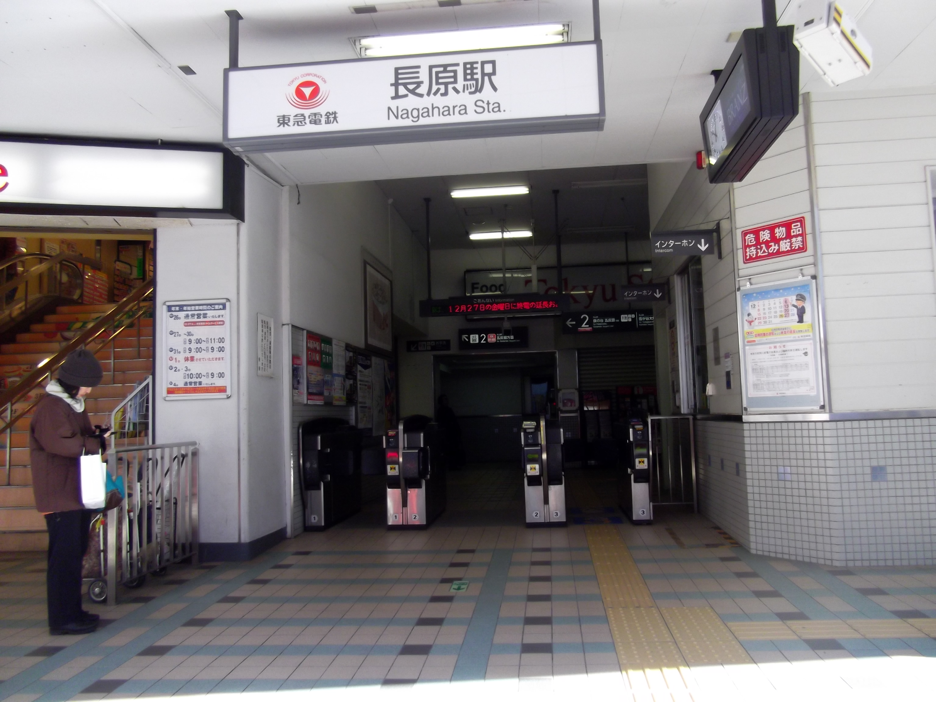 長原駅の改札を撮影した画像